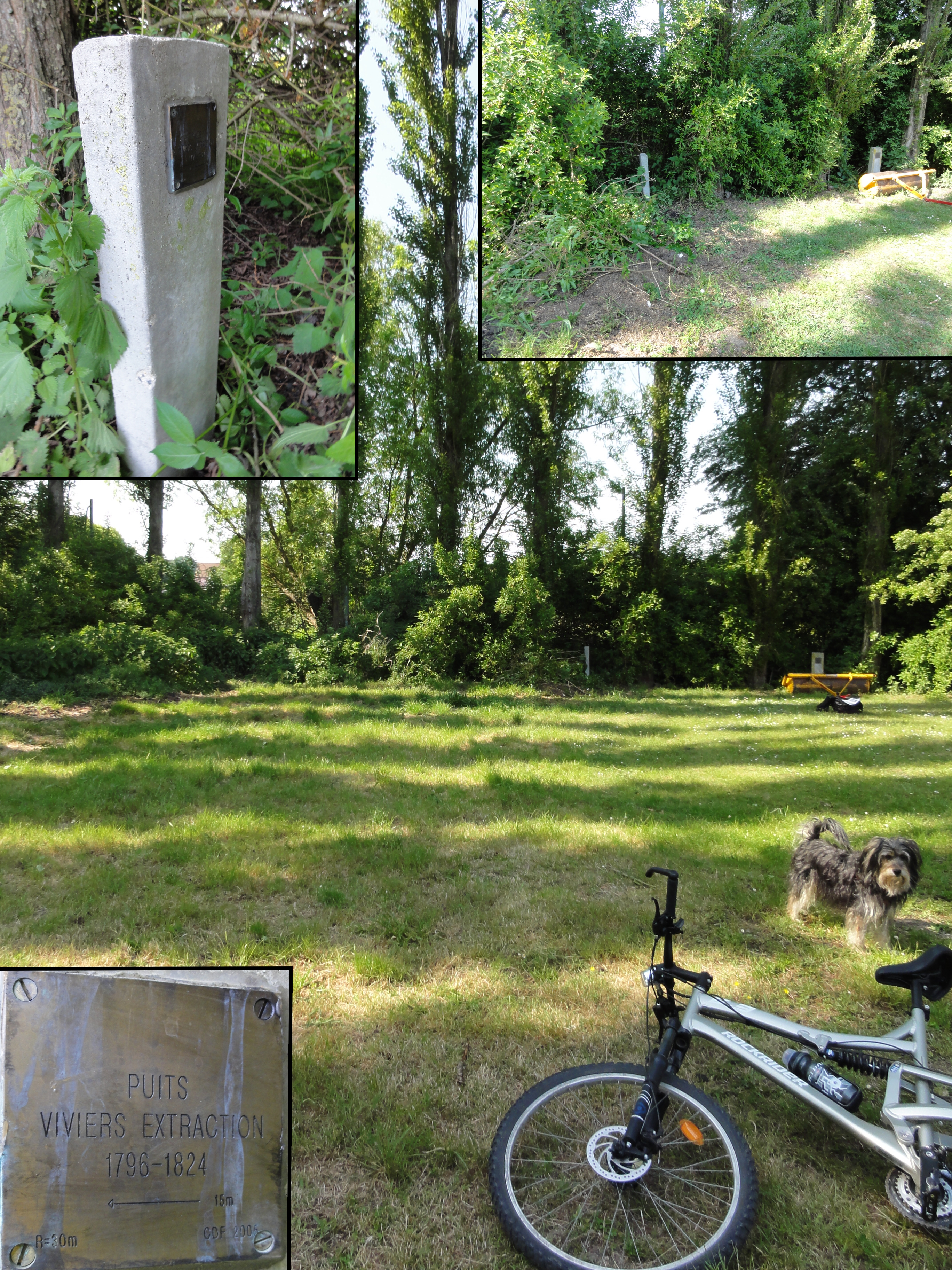 La Fosse Viviers de la Compagnie des mines d'Anzin était un charbonnage constitué de deux puits situé à Fresnes-sur-Escaut, Nord, Nord-Pas-de-Calais, France. Le vélo indique l'emplacement du puits d'extraction.